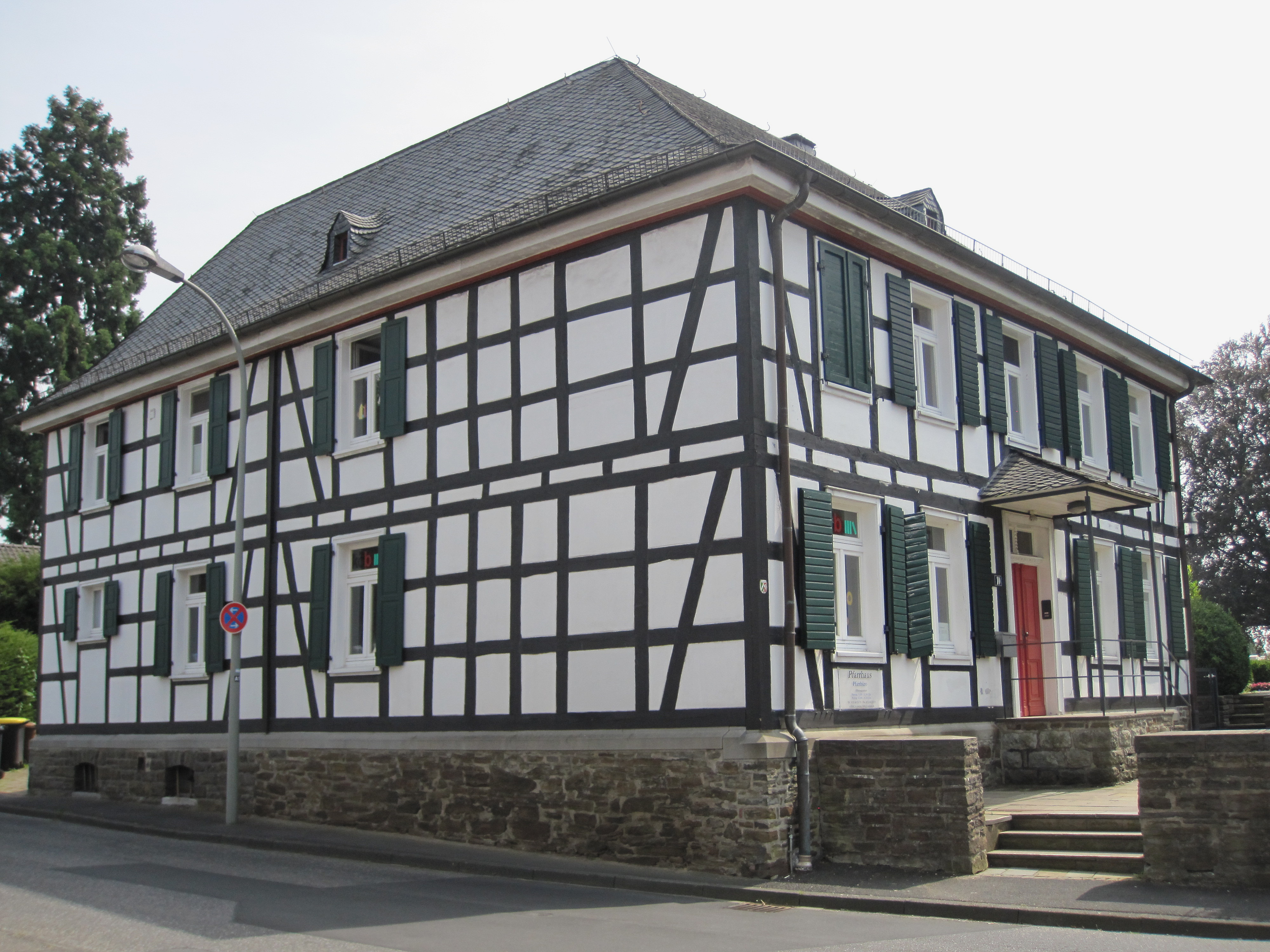 Inger Birker Straße 10 Pfarrhaus